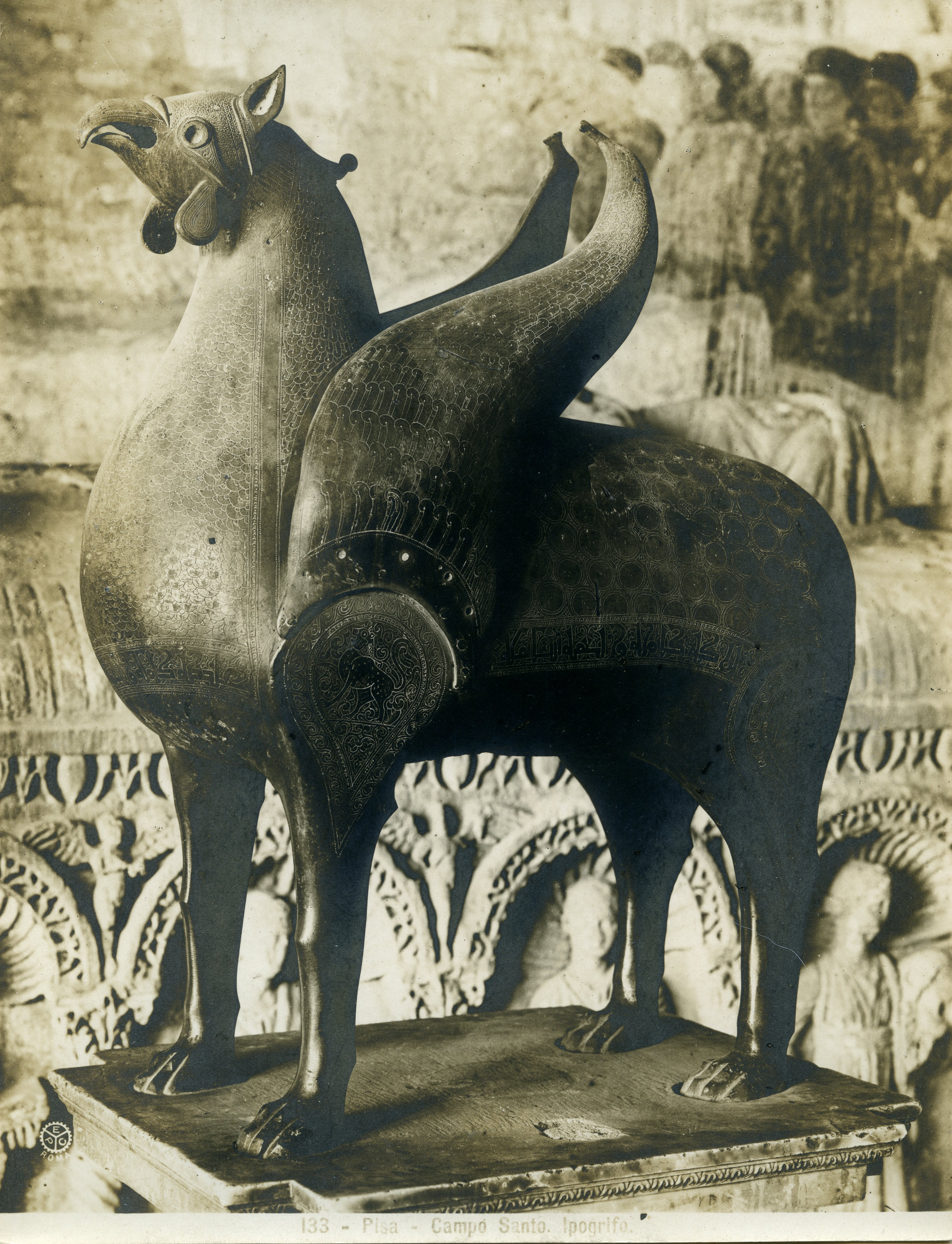 Bronze Griffin, Camposanto, Pisa